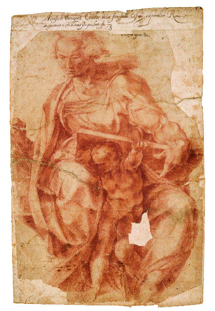 Profeta Daniel (copia de Miguel Angel), dibuj a la sanguina, 399 x 281 mm. Museo de Bellas Artes de Valencia.